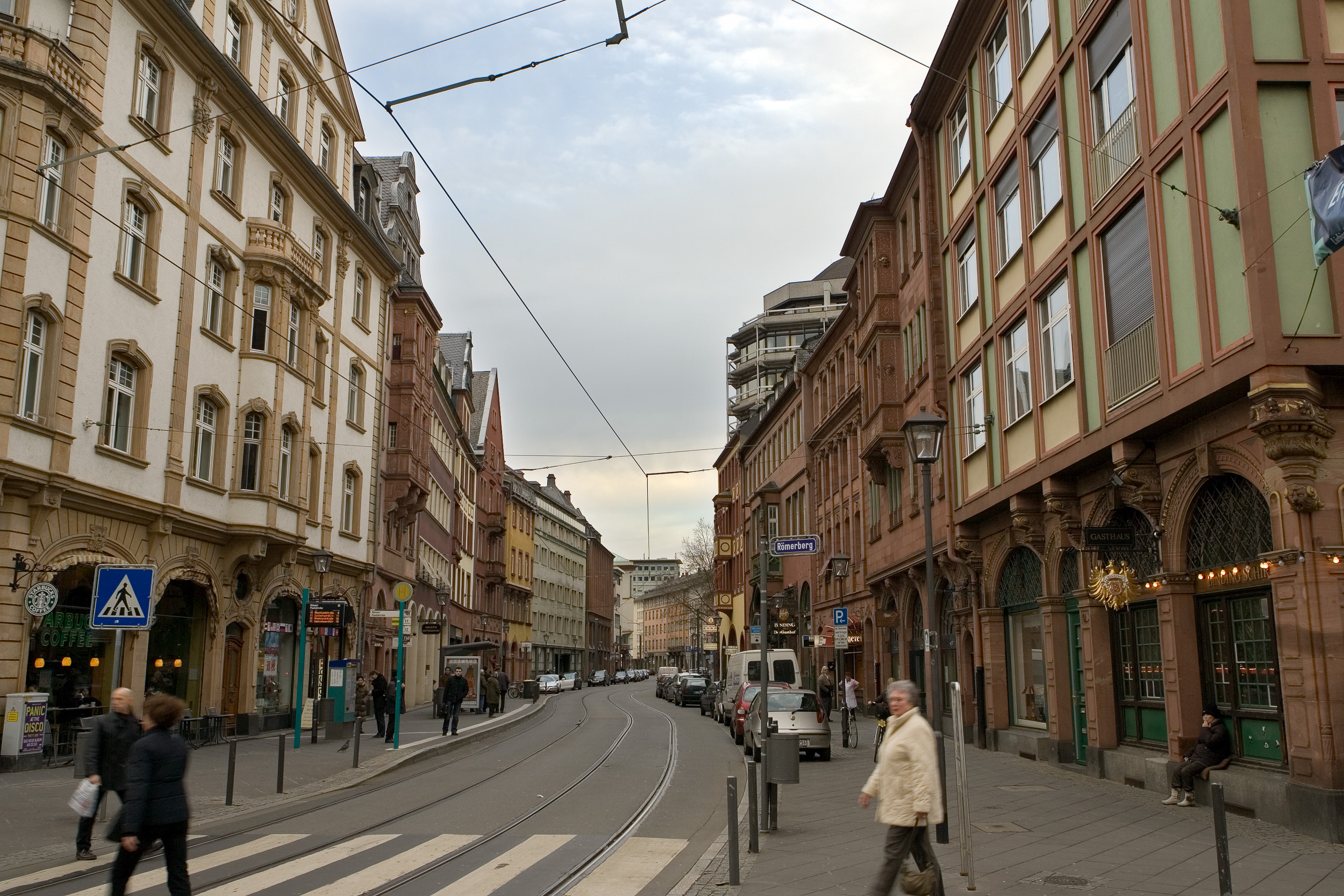 Blick in die Braubachstraße in der Altstadt von Frankfurt am Main nach Osten. Selber fotografiert im März 2008, Doppellizensierung GFDL & CC-BY-SA 2.5.